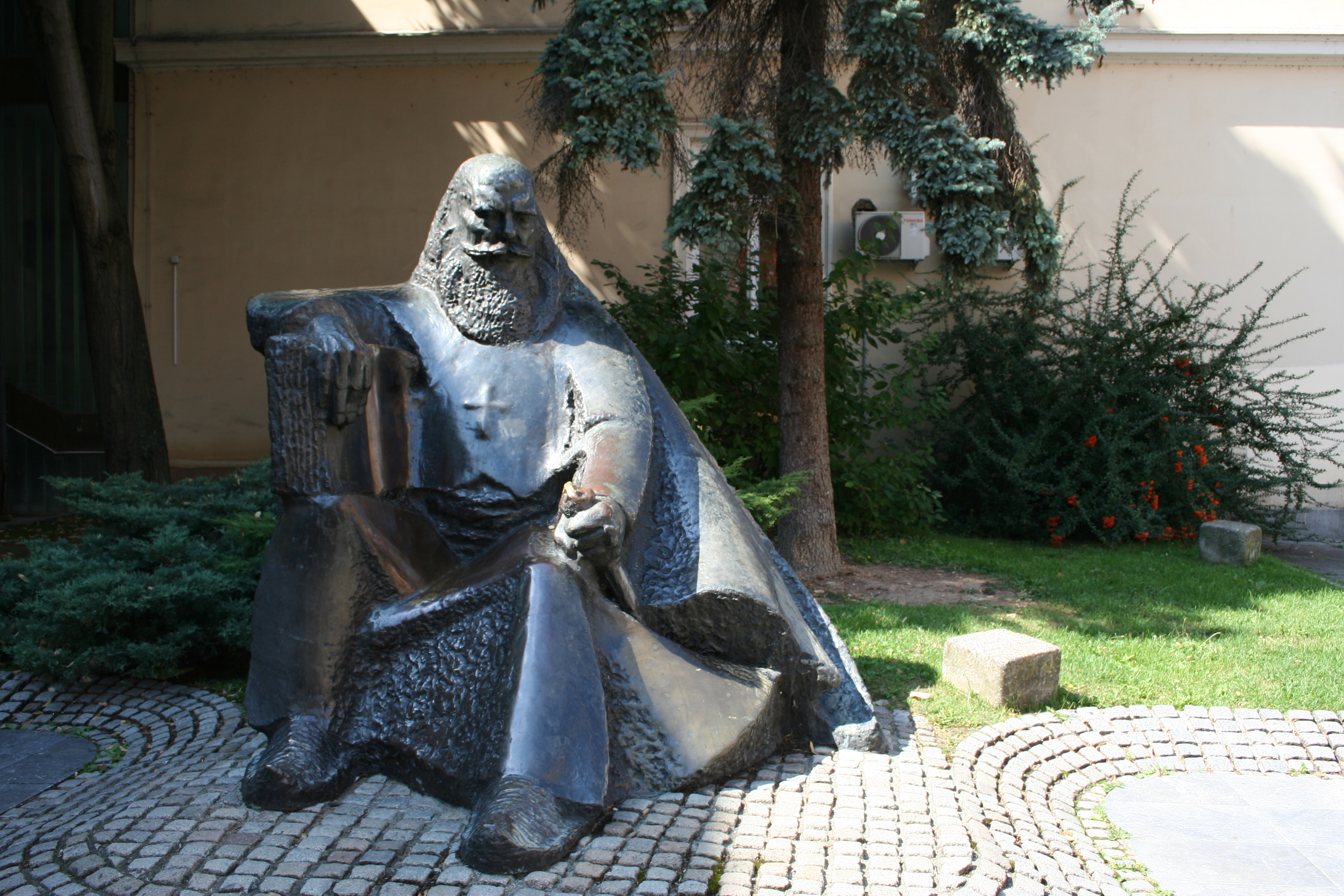 Spomenici Valjevo